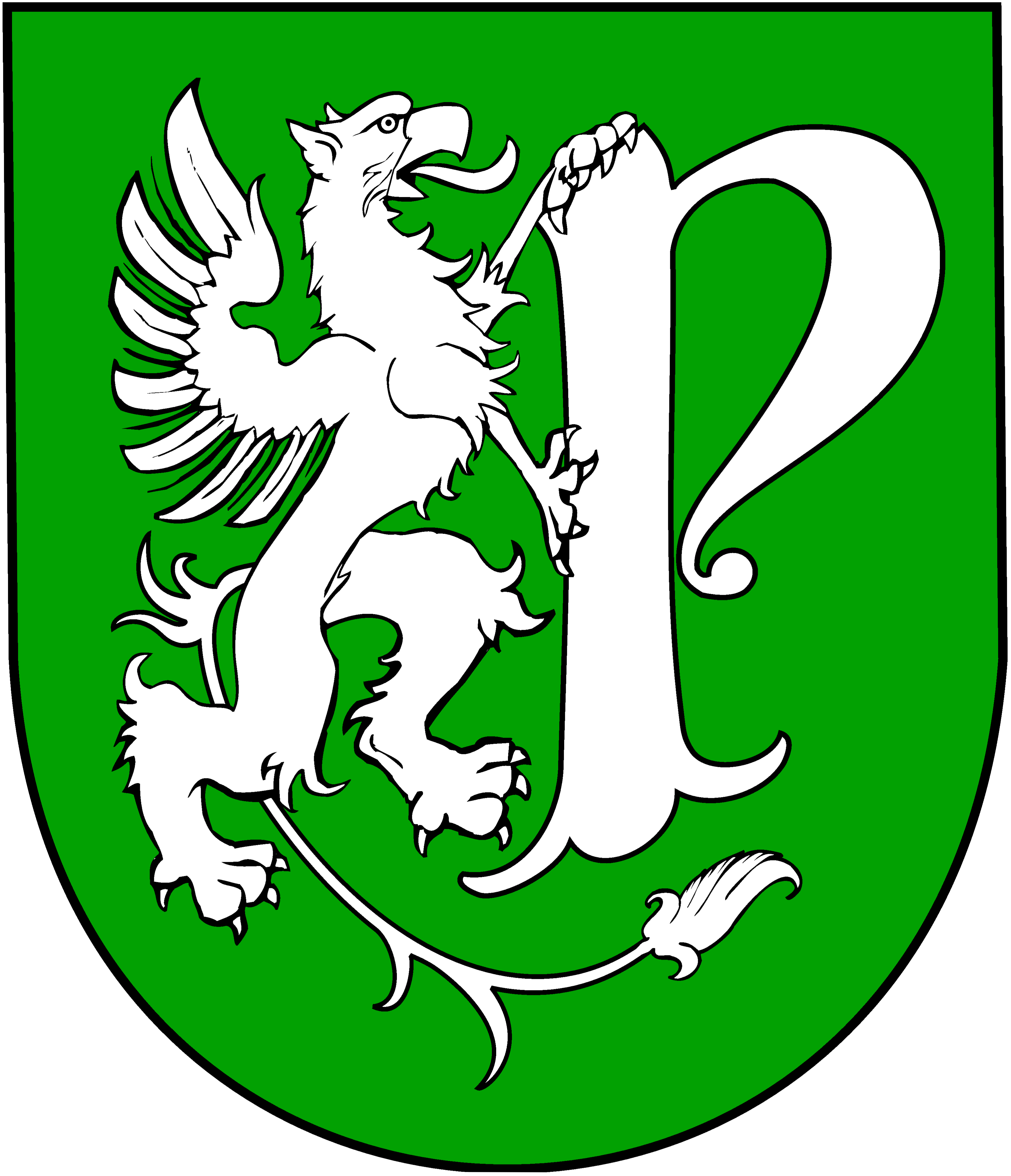 Herb gminy Pruszcz Gdański